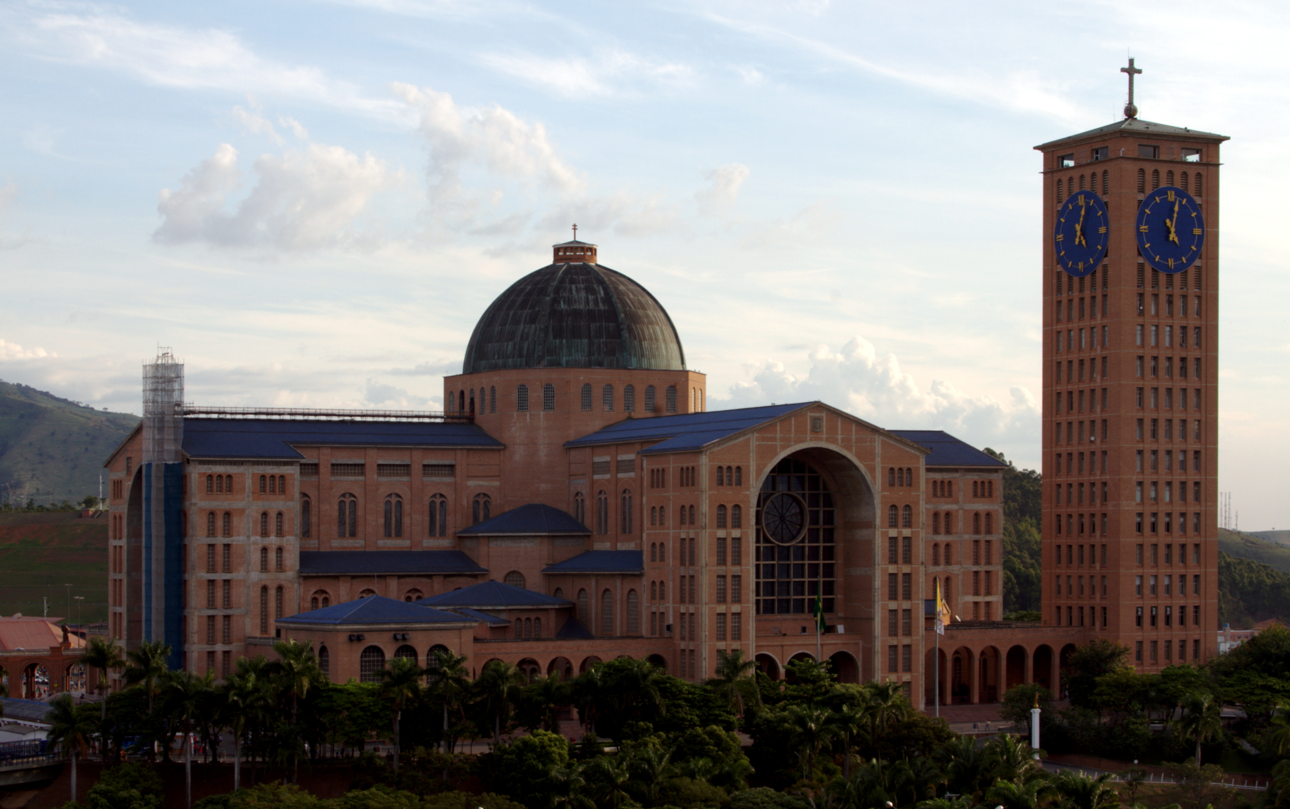 Vistas da Basílica de Nossa Senhora a partir do morro no alto da cidade